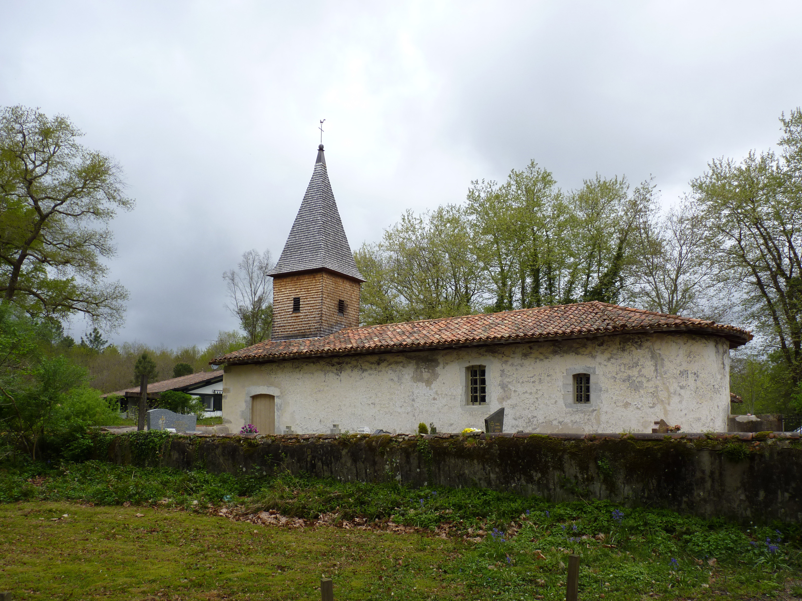 La chapelle de Gourby (Rivière-Saas-et-Gourby)